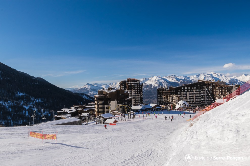 Les Orres 1650, prise de vue à partir d'une piste de ski.